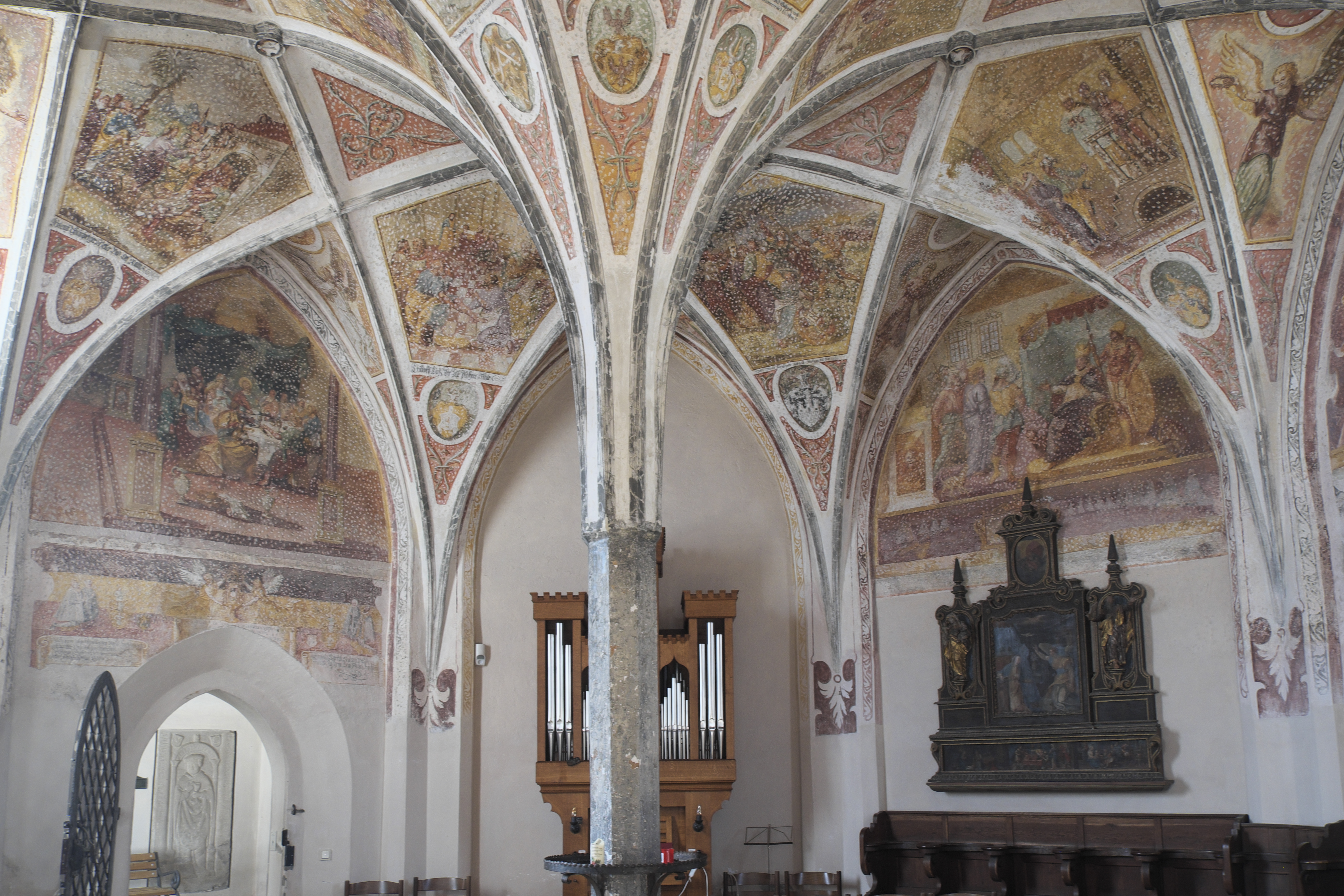 Katholische Friedhofskirche St. Salvator und Sebastian in Weilheim in Oberbayern im Landkreis Weilheim-Schongau (Bayern/Deutschland), Freskenzyklus zur Passion Christi von Elias Greuter (Greither) dem Älteren zwischen 1591 und 1615 geschaffen, Mittelsäule